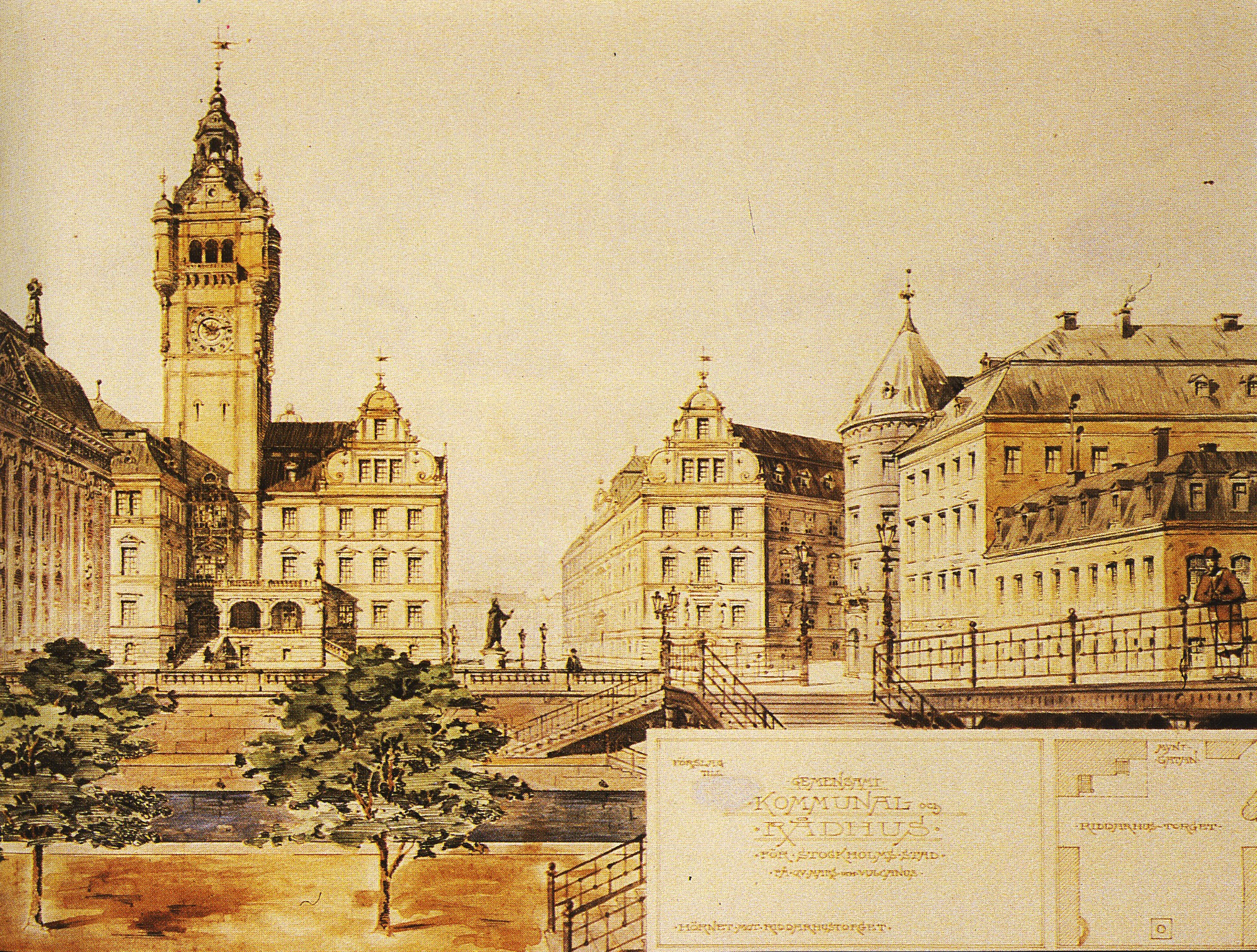 Förslag till ny bebyggelse i Gamla stan, området Mynttorget och Riddarhuset